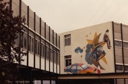 Premier bâtiment de Villeneuve-la-Garenne. D'une architecture Pailleron, il sera reconstruit entre 1993 et 1997